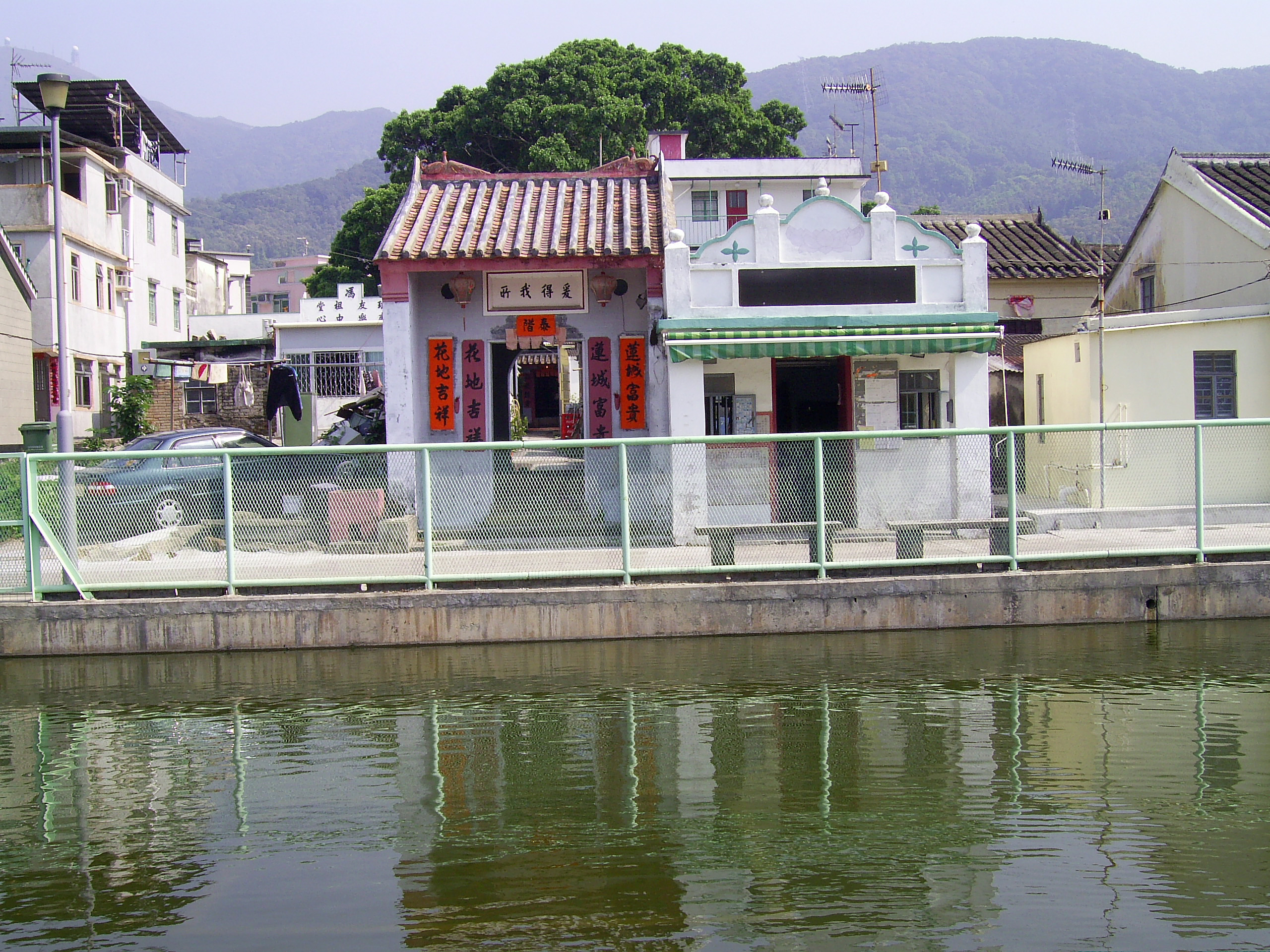 中文（香港）: 蓮花地